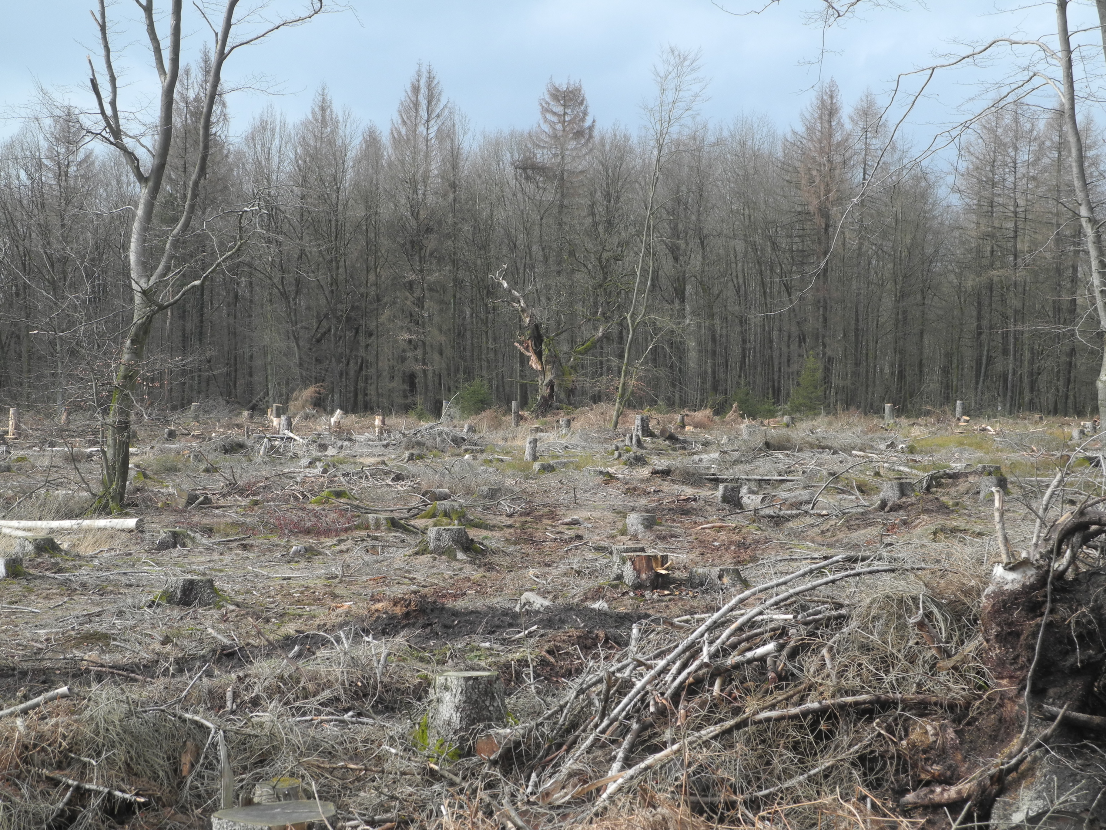 Naturdenkmal im Landkreis Kassel 6.33.673. Sehr alte Huteeiche „Gerichtseiche“ (Stieleiche, Quercus robur) im Reinhardswald, ca. 3,0 km nördlich des Ortsrandes von Holzhausen.